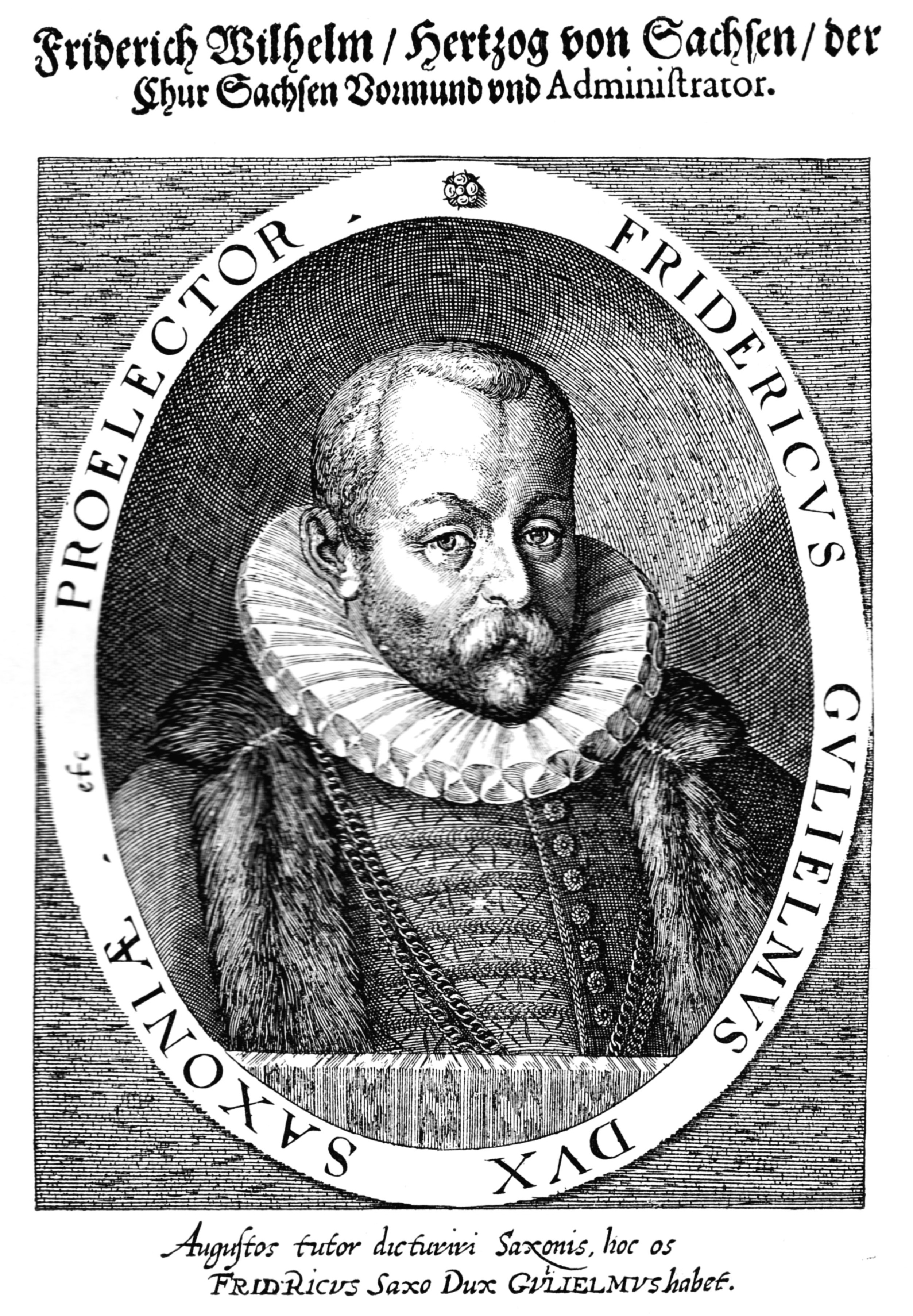 Friderich Wilhelm / Hertzog von Sachsen / der Chur Sachsen Vormund und Administrator